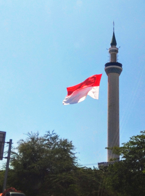 Menara Masjid Al-Akbar Surabaya mengibarkan bendera Indonesia